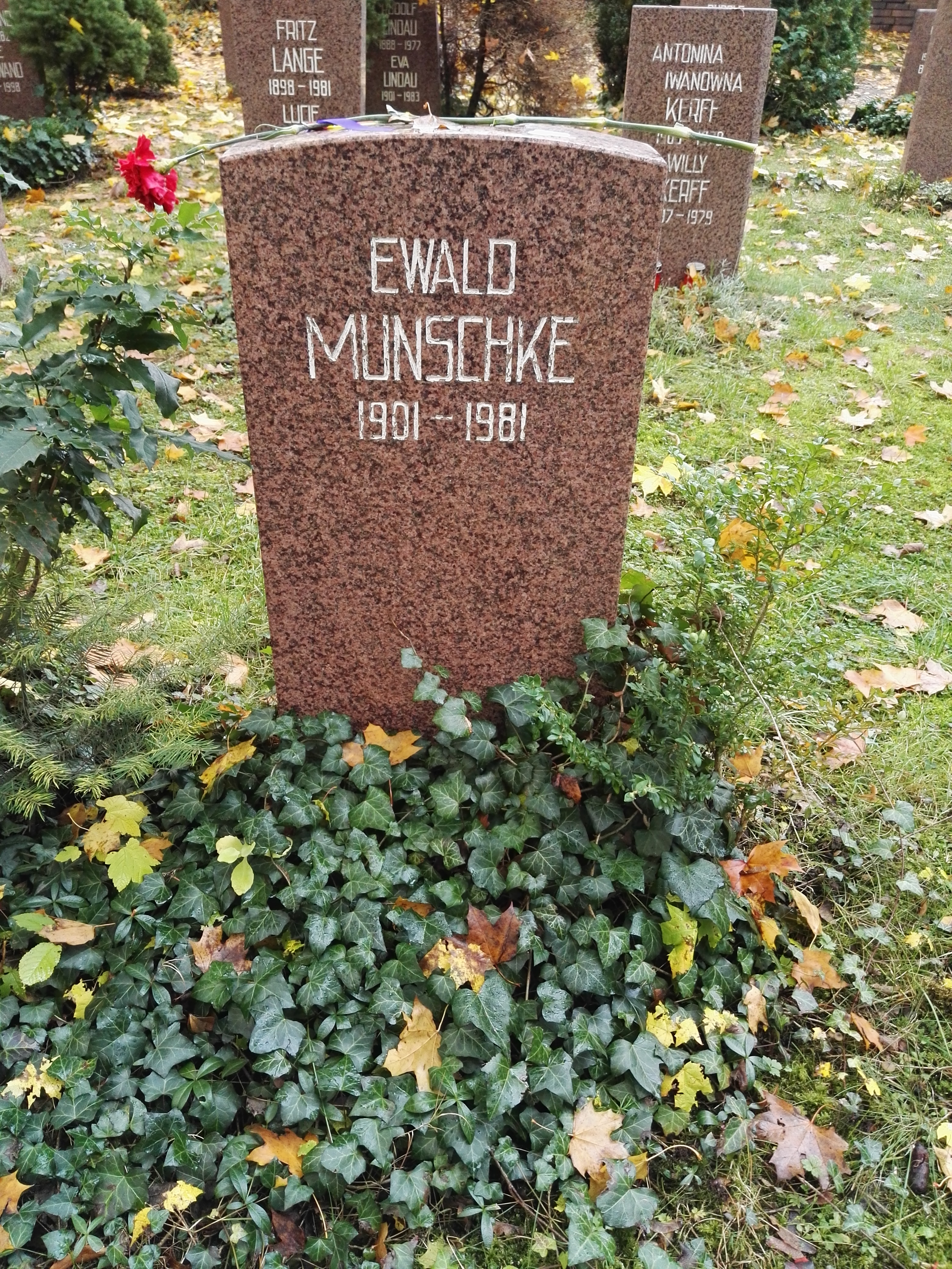 Grab von Ewald Munschke auf dem Sozialistenfriedhof des Zentralfriedhofs Friedrichsfelde